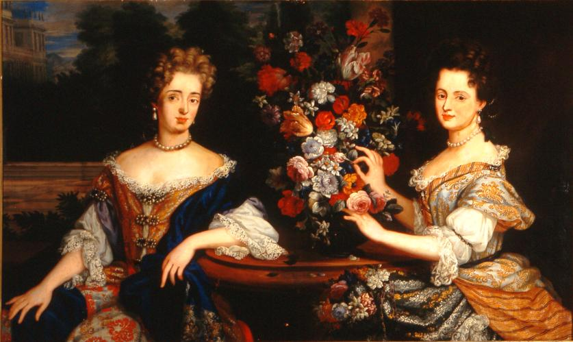 Duchess Sibylle of Saxe-Lauenburg (left) with her sister Anna Maria Franziska of Saxe-Lauenburg (right)